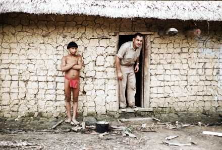 Alfonso Vinci con un indio Makiritari(Spedizione Shiriana, Venezuela)